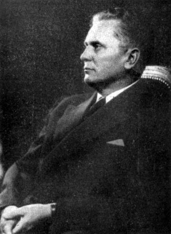 Josip Broz Tito.